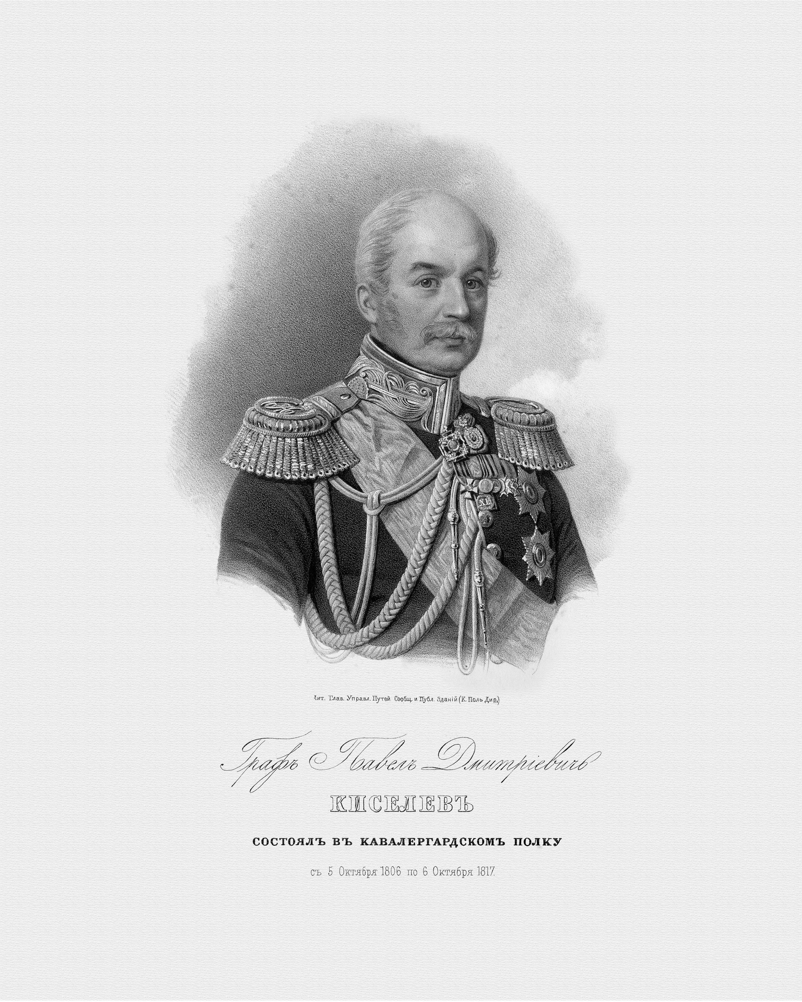 Portrait du Comte Pavel Dmitrievitch KISELEV